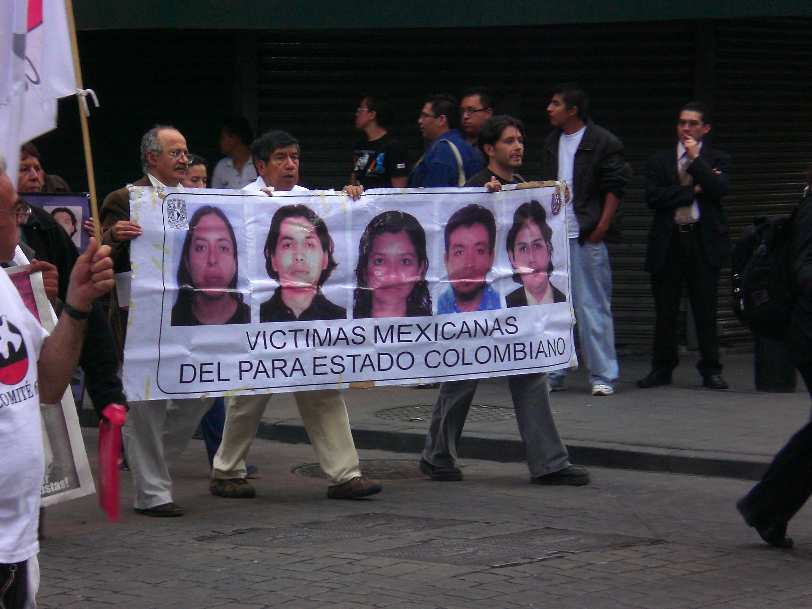 Victimas Mexicanas del bombardeo de Angostura, tras la operacion Fenix de las Fuerzas Militares de Colombia en territorio ecuatoriano contra un campamento de las FARC.